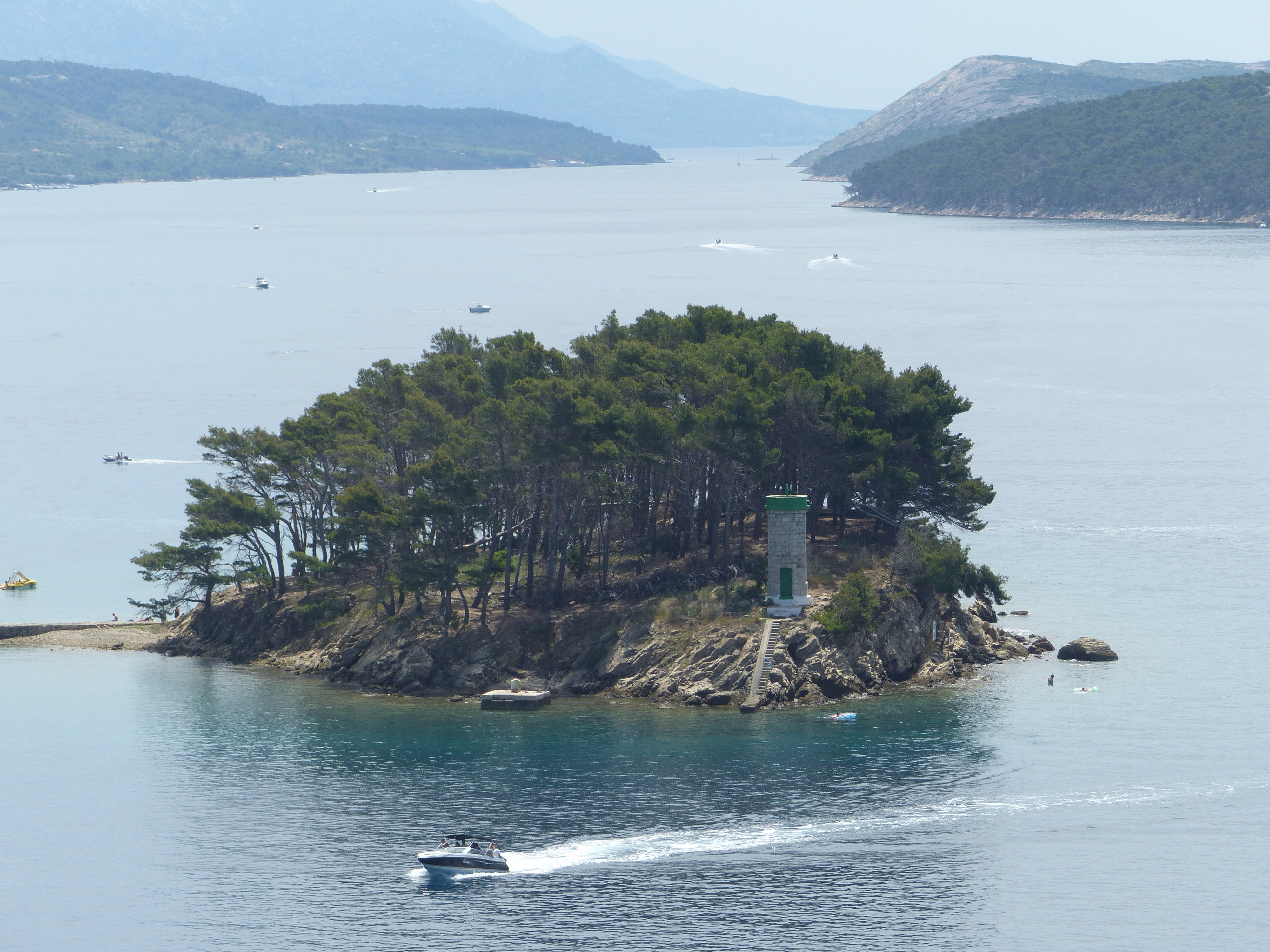 A felvétel 2016. június 30-án készült Rab városában. Rab sziget, Horvátország. Kilátás a Harangtoronyból a városra és környékére.